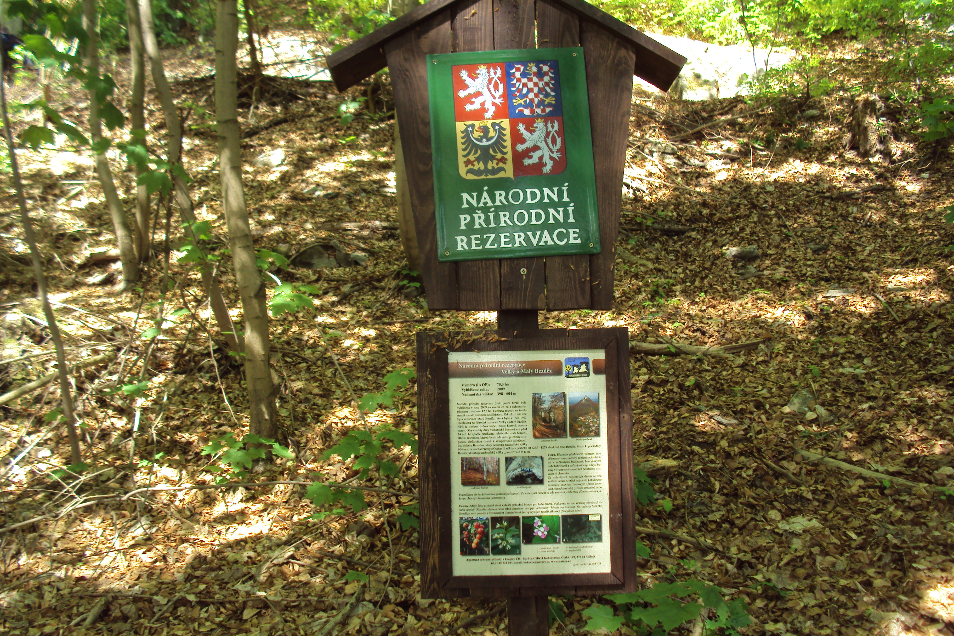 Hranice Nárorní přírodní rezervace Velký a Malý Bezděz, u cesty na hrad